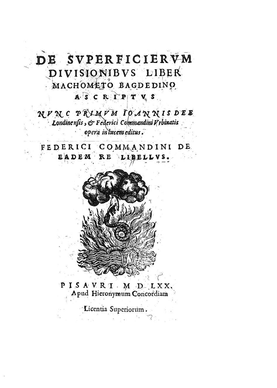 De superficierum diuisionibus liber Machometo Bagdedino ascriptus nunc primum Ioannis Dee Londinensis, & Federici Commandini Vrbinatis opera in lucem editus. Federici Commandini De eadem re libellus. - Pisauri : apud Hieronymum Concordiam, 1570. - [8], 76 p. : ill. ; 4º .